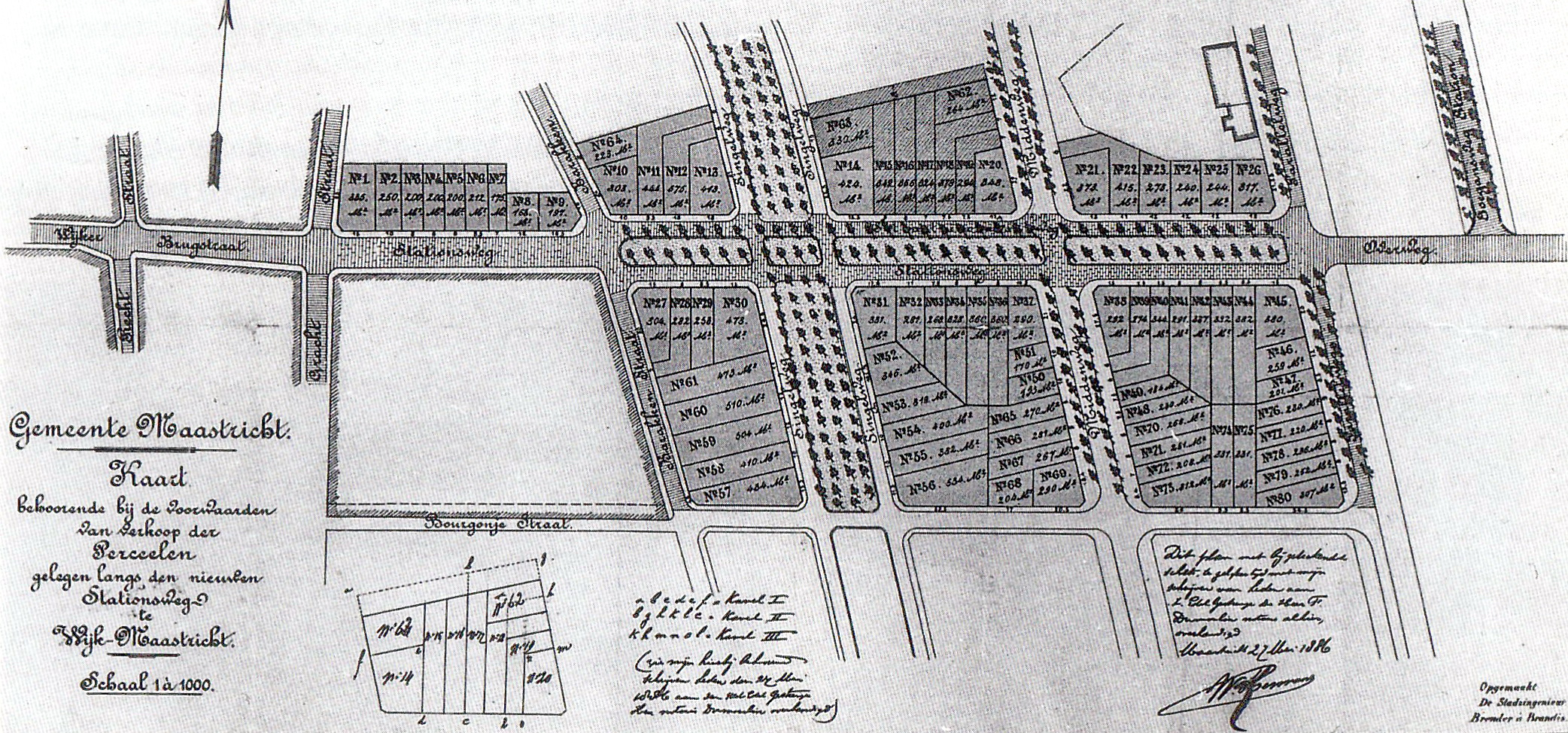 "Kaart behoorende bij de voorwaarden van verkoop der perceelen gelegen langs den nieuwen Stationsweg te Wijk-Maastricht". Verkavelingsplan uit 1886 van de te bebouwen Stationsbuurt in Maastricht door ir. A. Brender à Brandis. Collectie Gemeente Archief Maastricht.